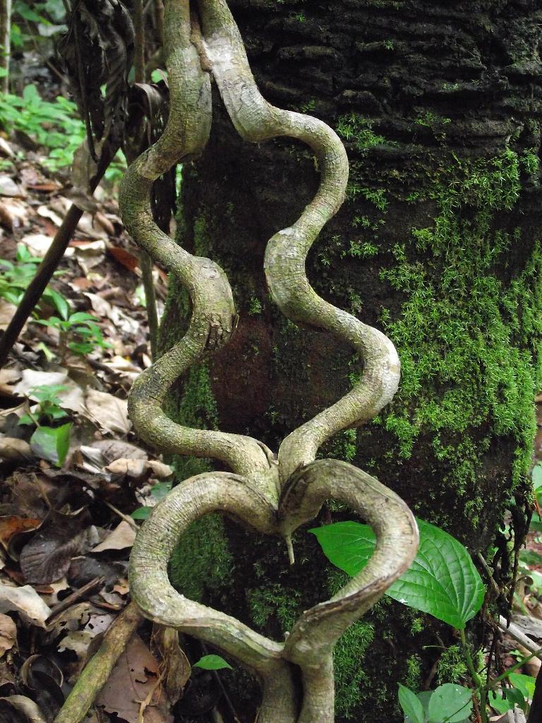 A bela forma do cipó (Brasil).